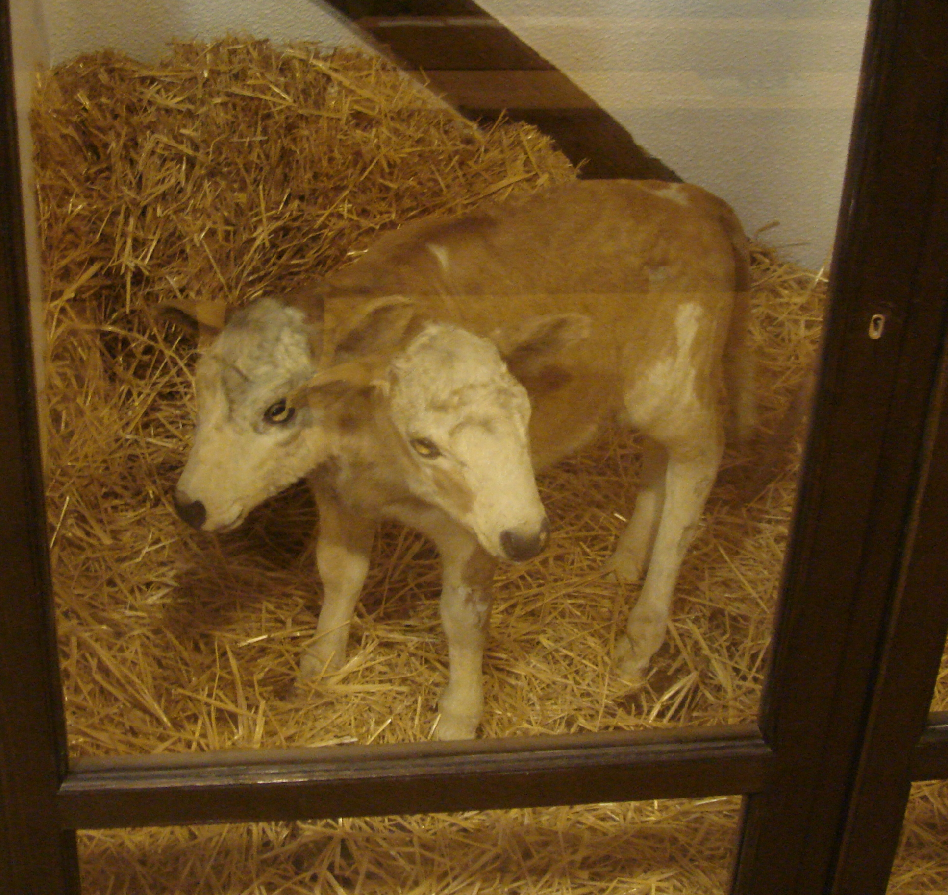 Doppelköpfiges KalbDieses kalb ist 2013 in der Lüneburgerheide geboren worden. Es kam durch eine Veränung der Schilddrüsen zu dieser Missbildung.